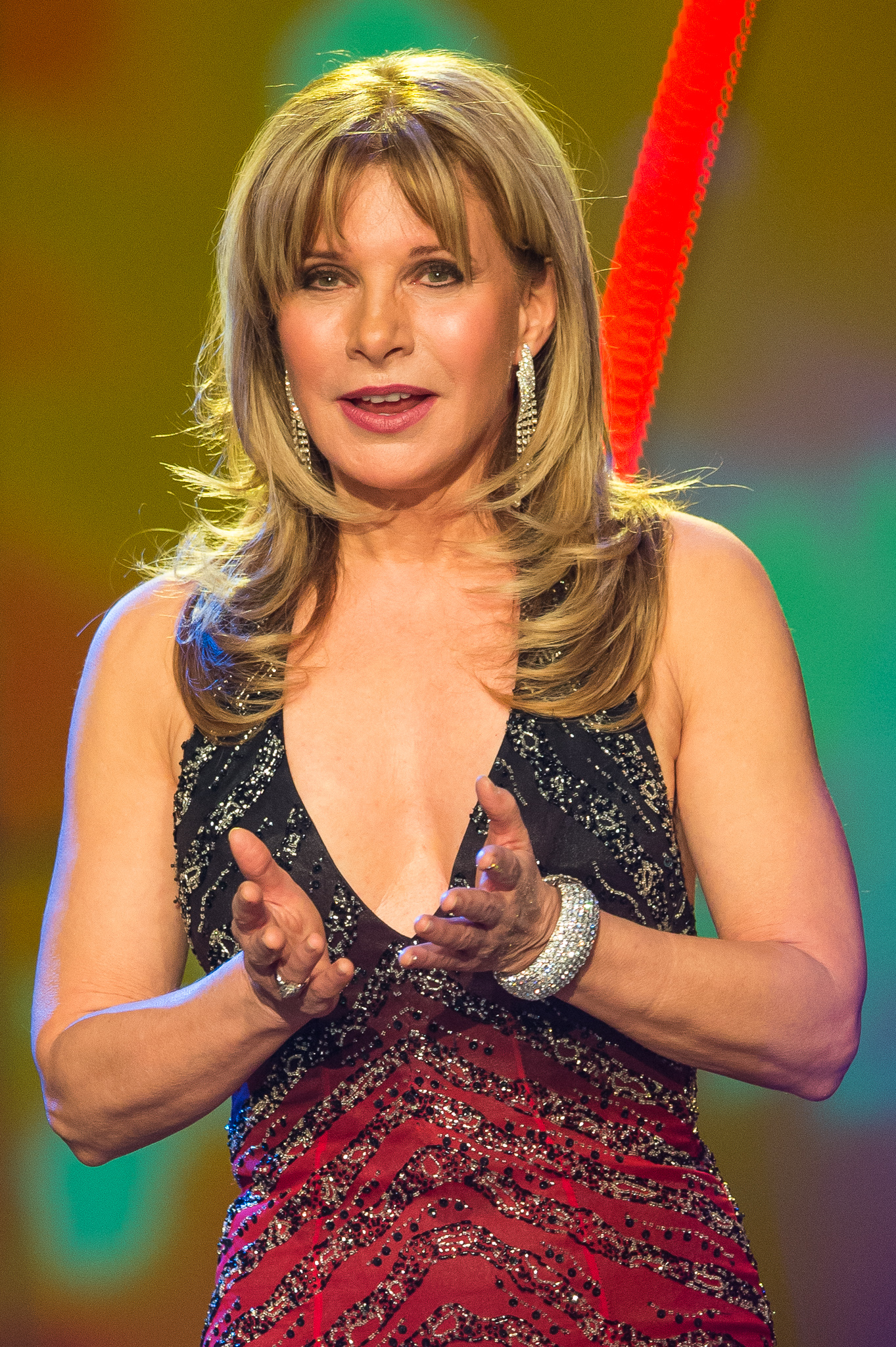 BR,Bayerisches Fernsehen,Deborah Sasson,Frankenhalle,Live-Sendung,Sternstunden-Gala